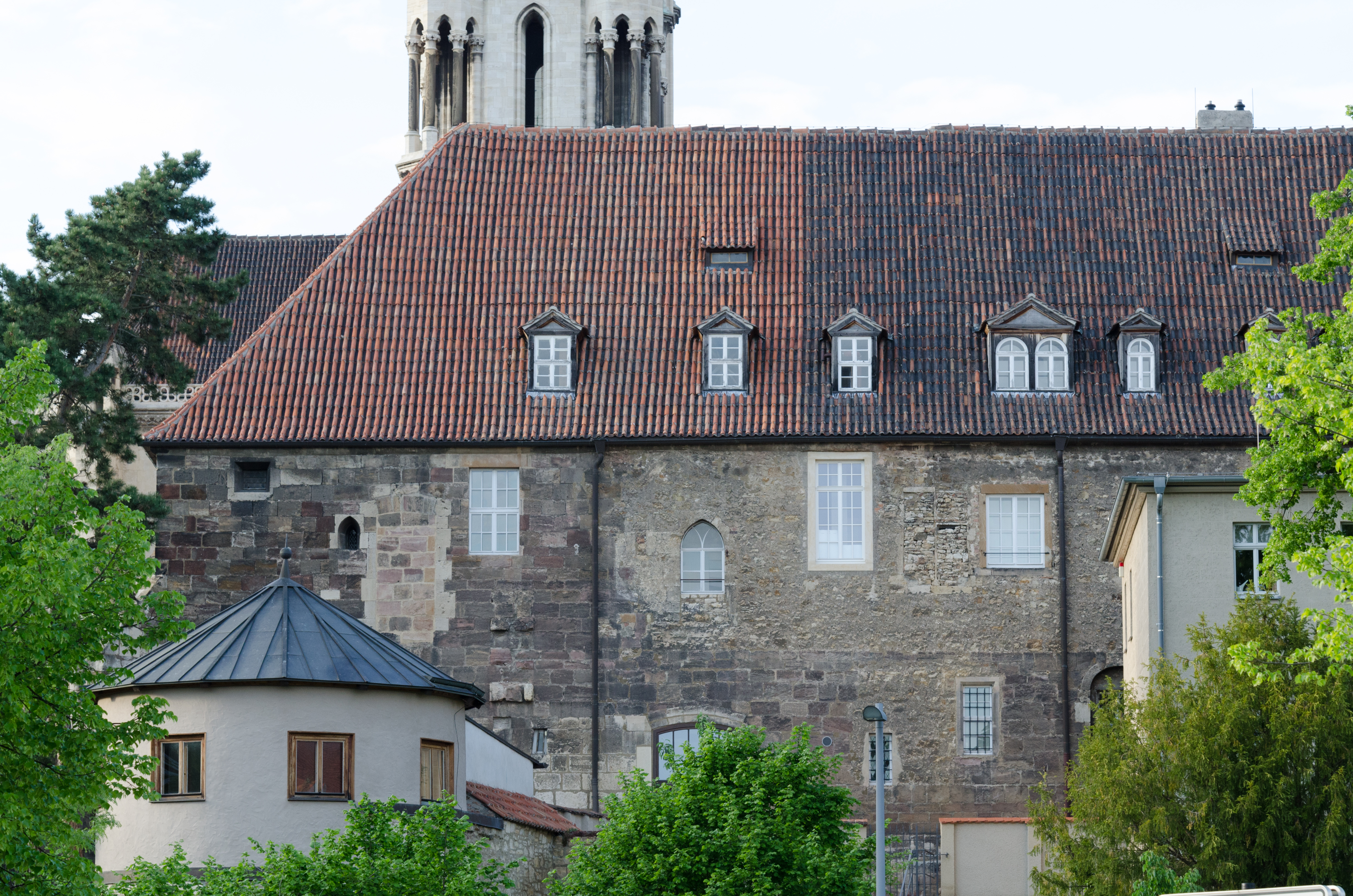 Naumburg, Domplatz 19